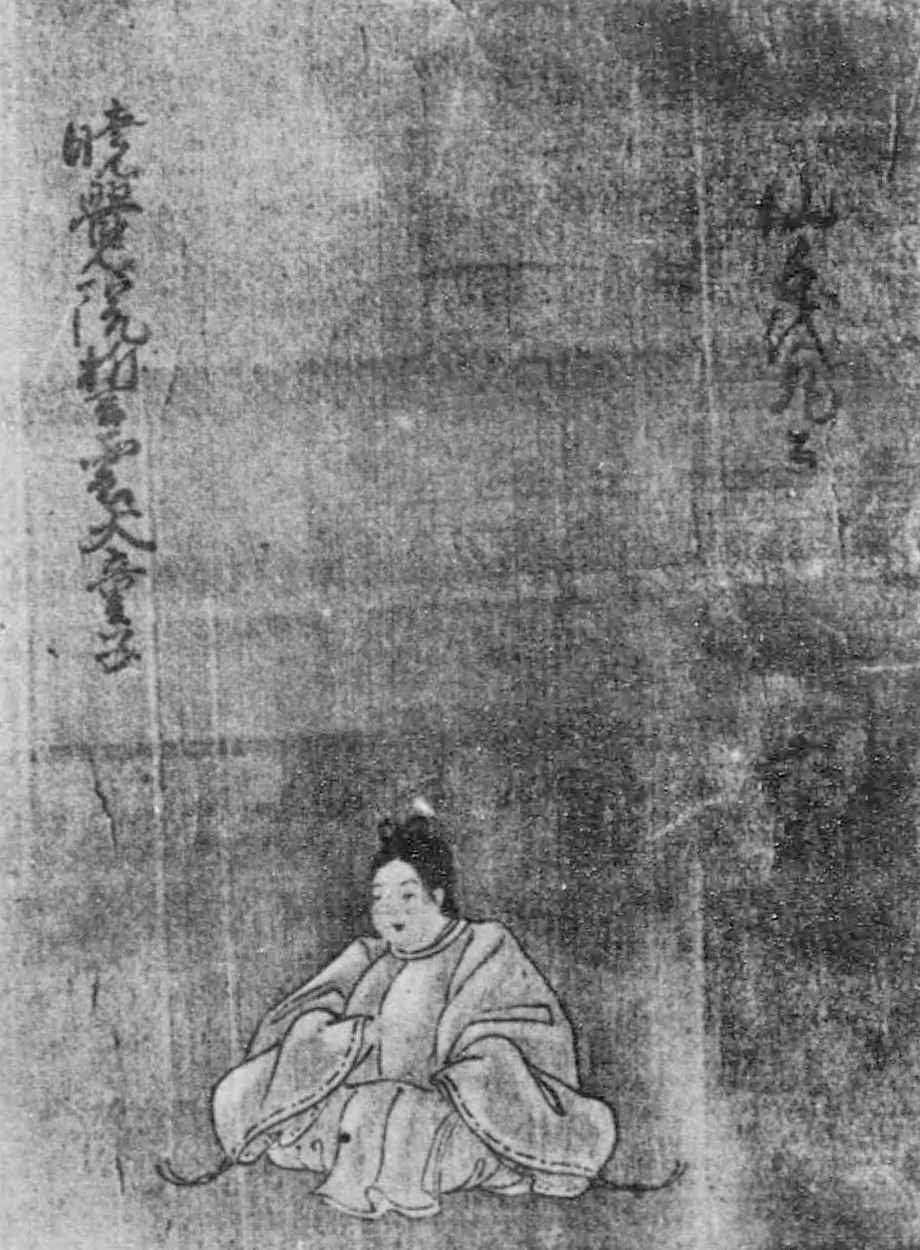 豊臣秀次長男仙千代丸（京都瑞泉寺所蔵）